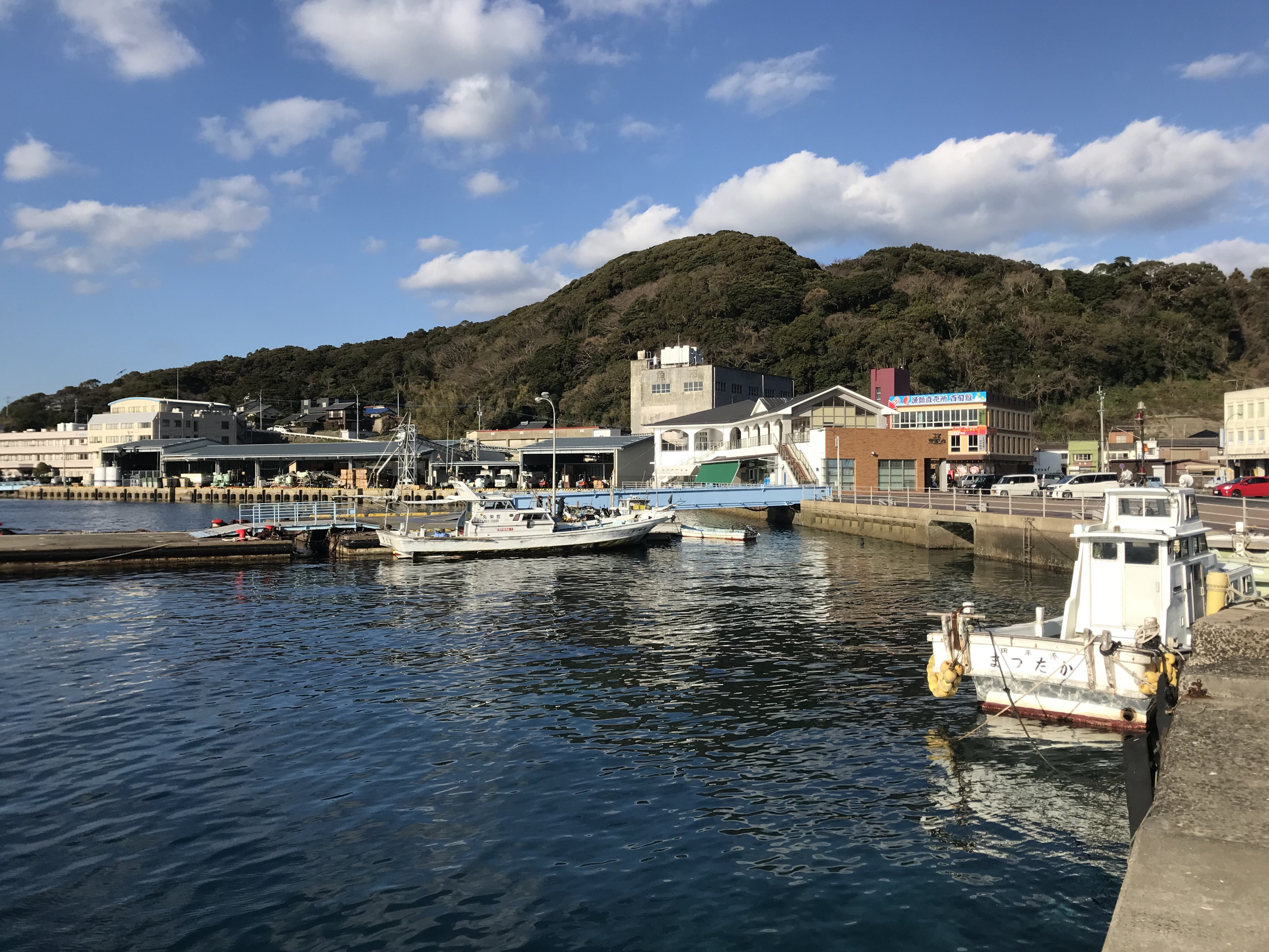 田平港の景色